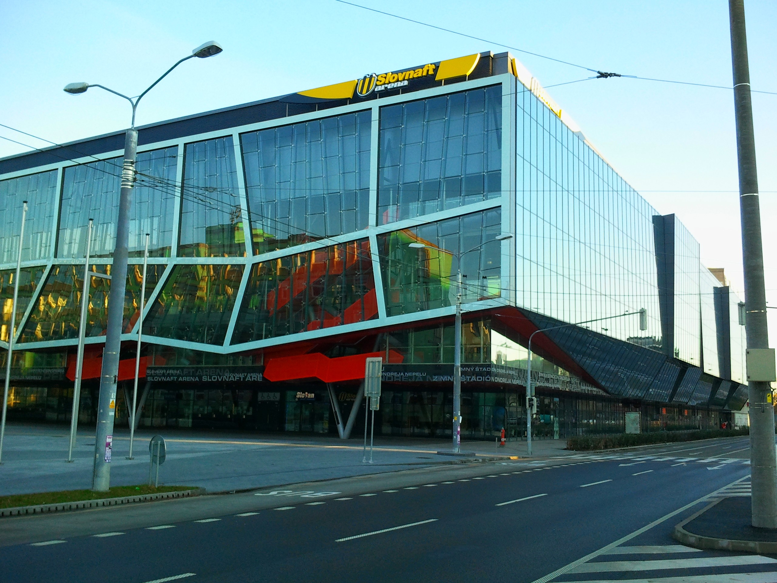 Bratislava